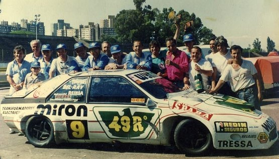 Silvio Oltra y su Renault Fuego, campeones de la temporada 1987 de TC200.